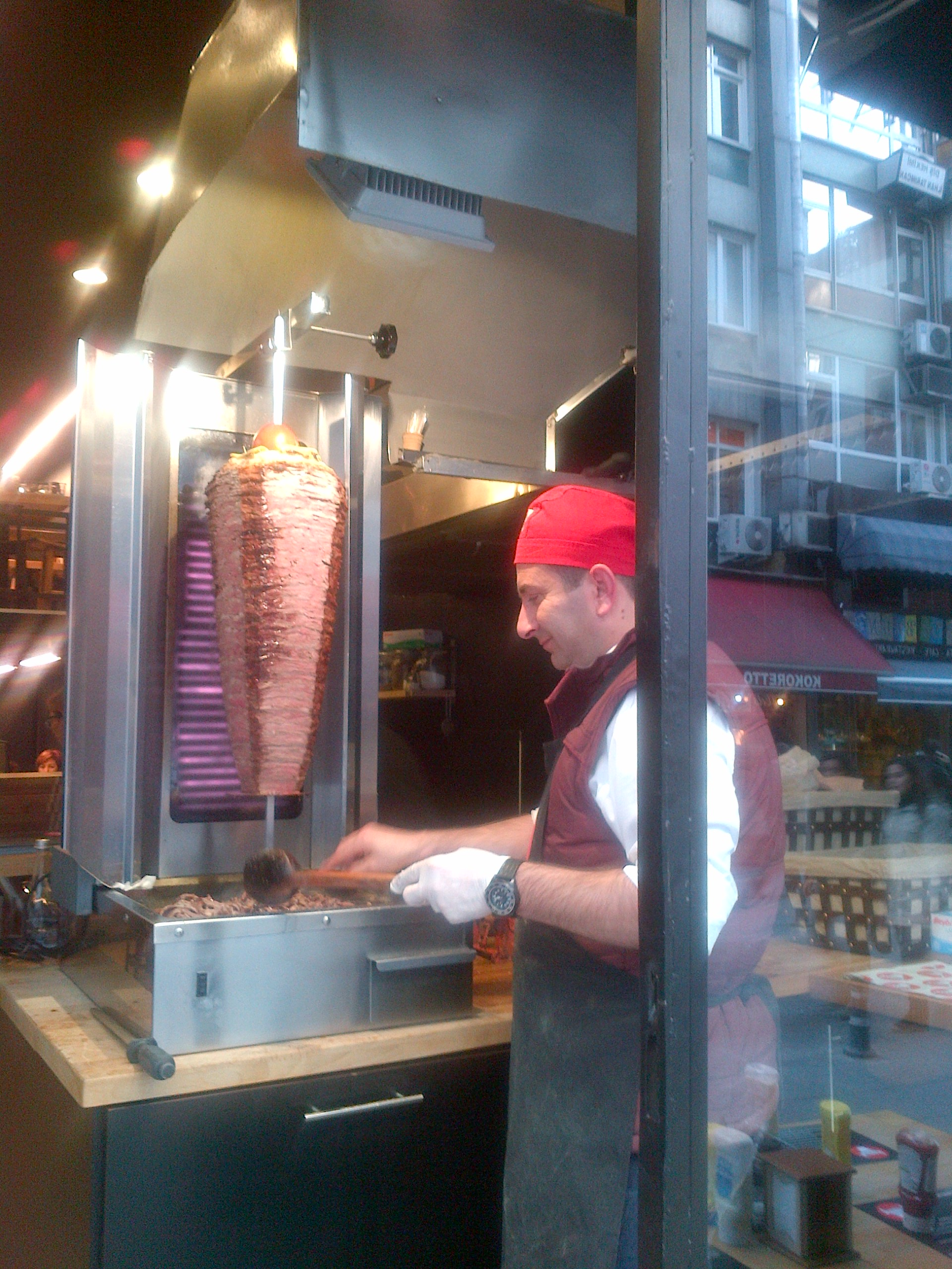 Döner de carne de ternera.